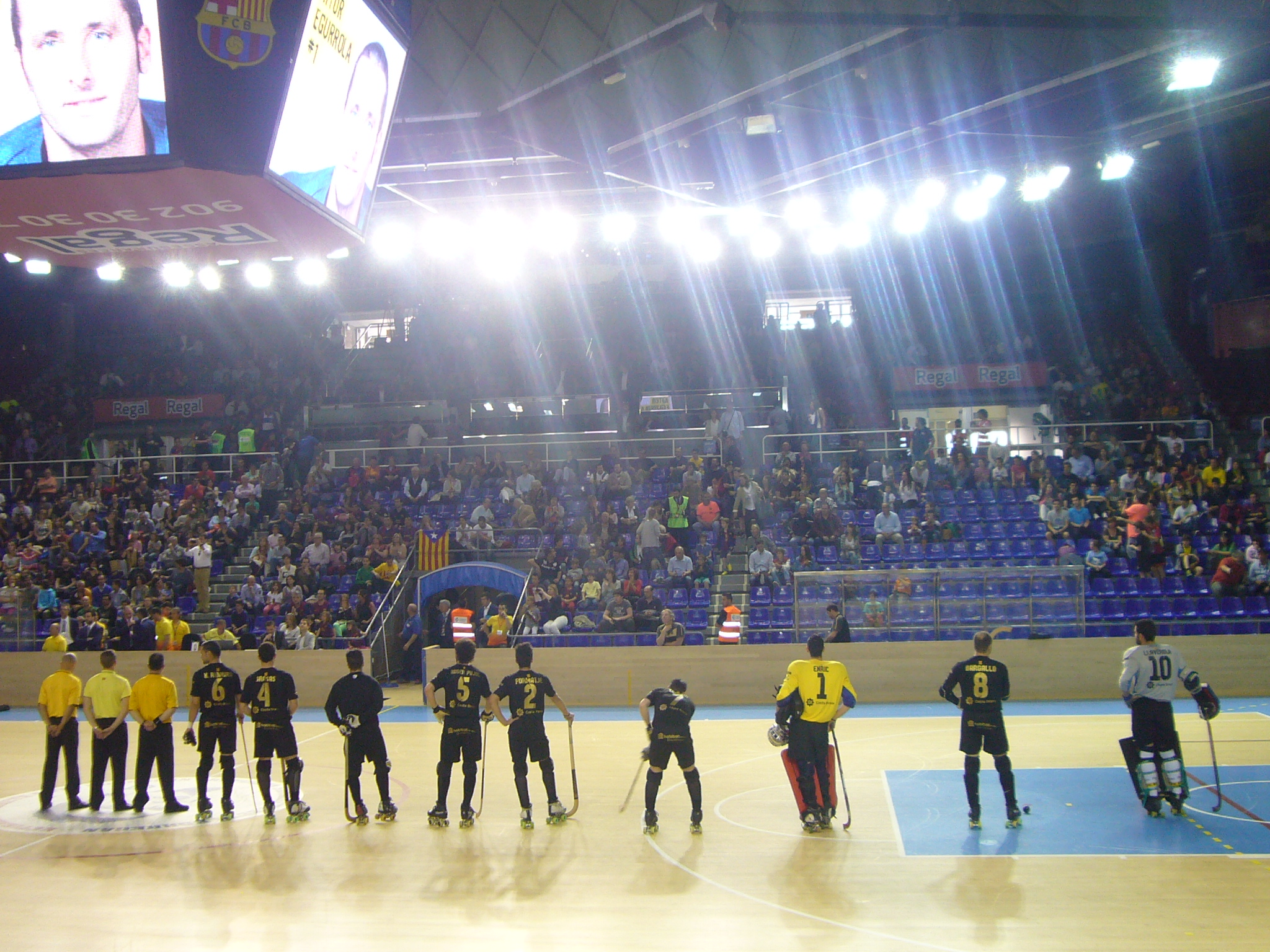 Hoquei patins - Barça 7 - Sather Blanes 2, al Palau Blaugrana